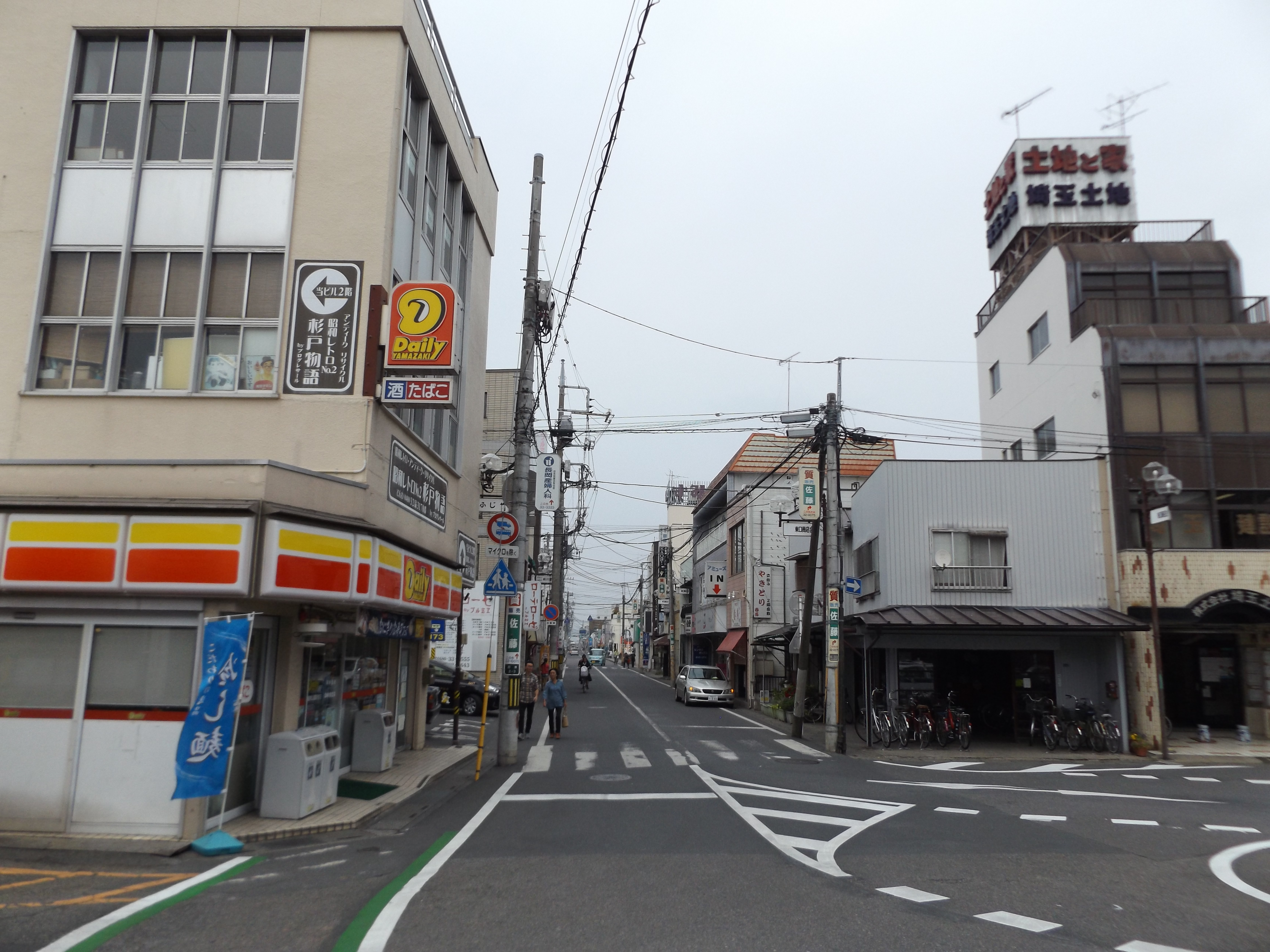 埼玉県南埼玉郡宮代町にある、埼玉県道408号東武動物公園停車場線の起点（東武伊勢崎線・日光線東武動物公園駅東口）。